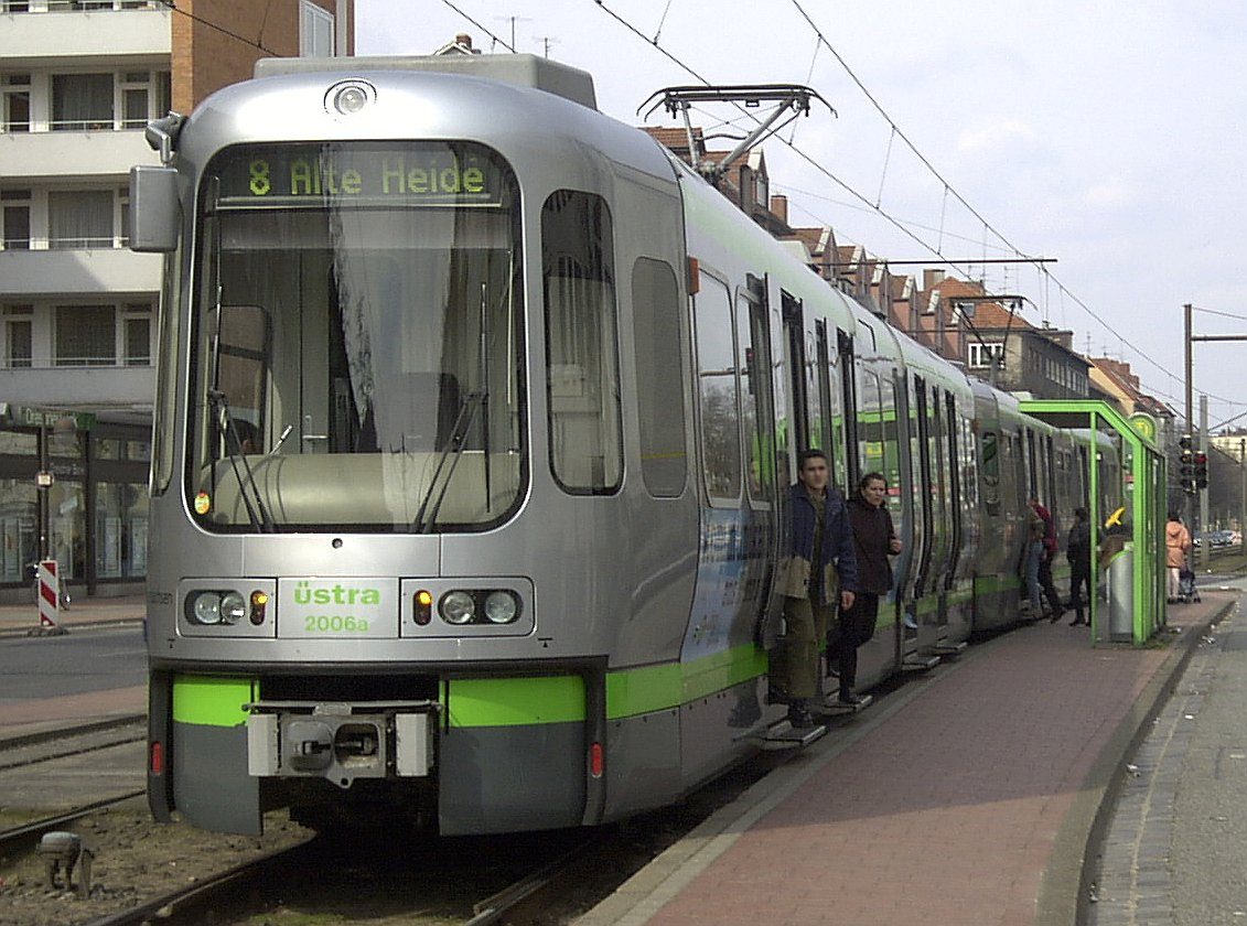 Stadtbahnfahrzeug vom Typ TW2000 in Hannover am 31.3.2001 an der Haltestelle Vahrenwalder Platz.